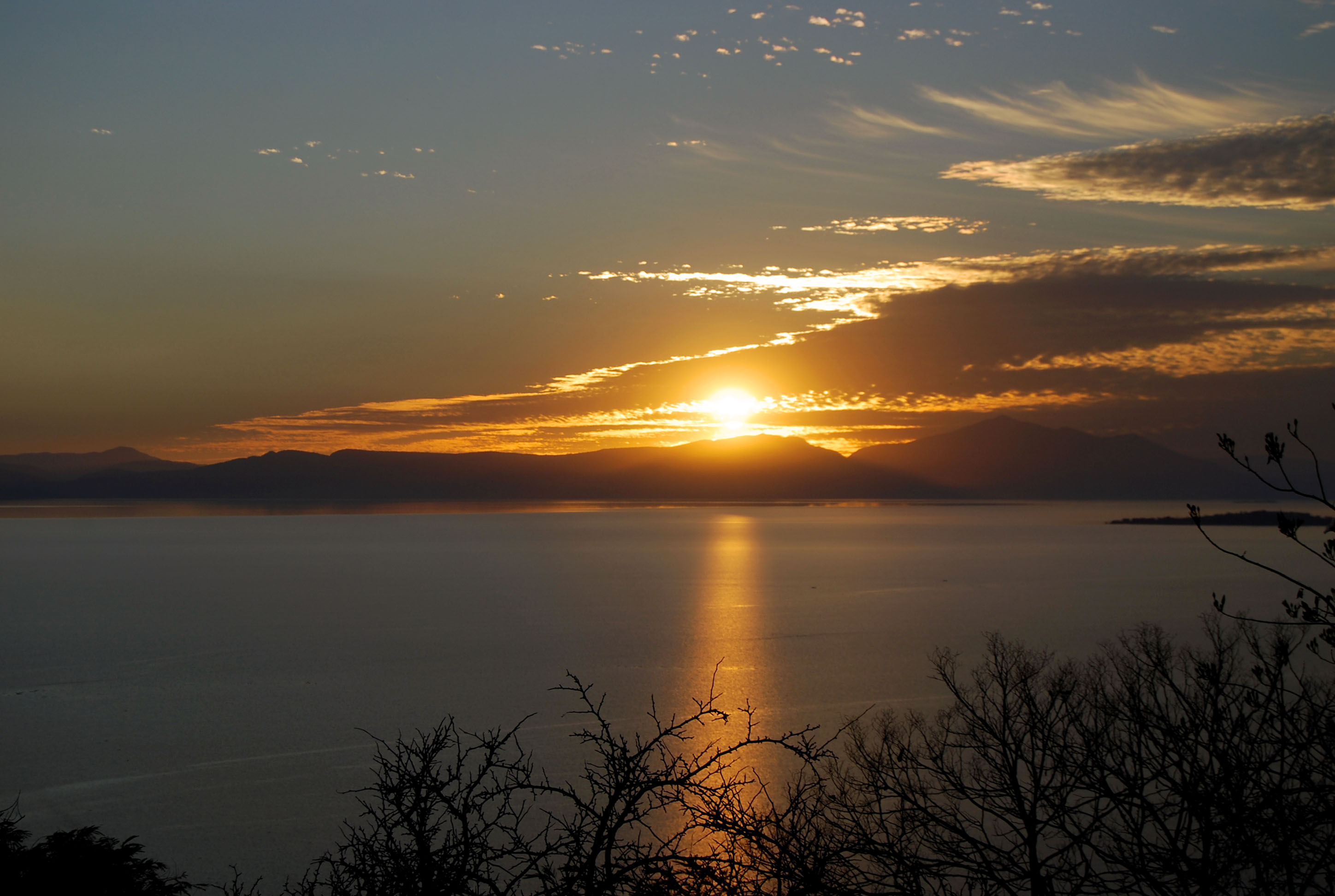 Atardecer en el lago de Chapala